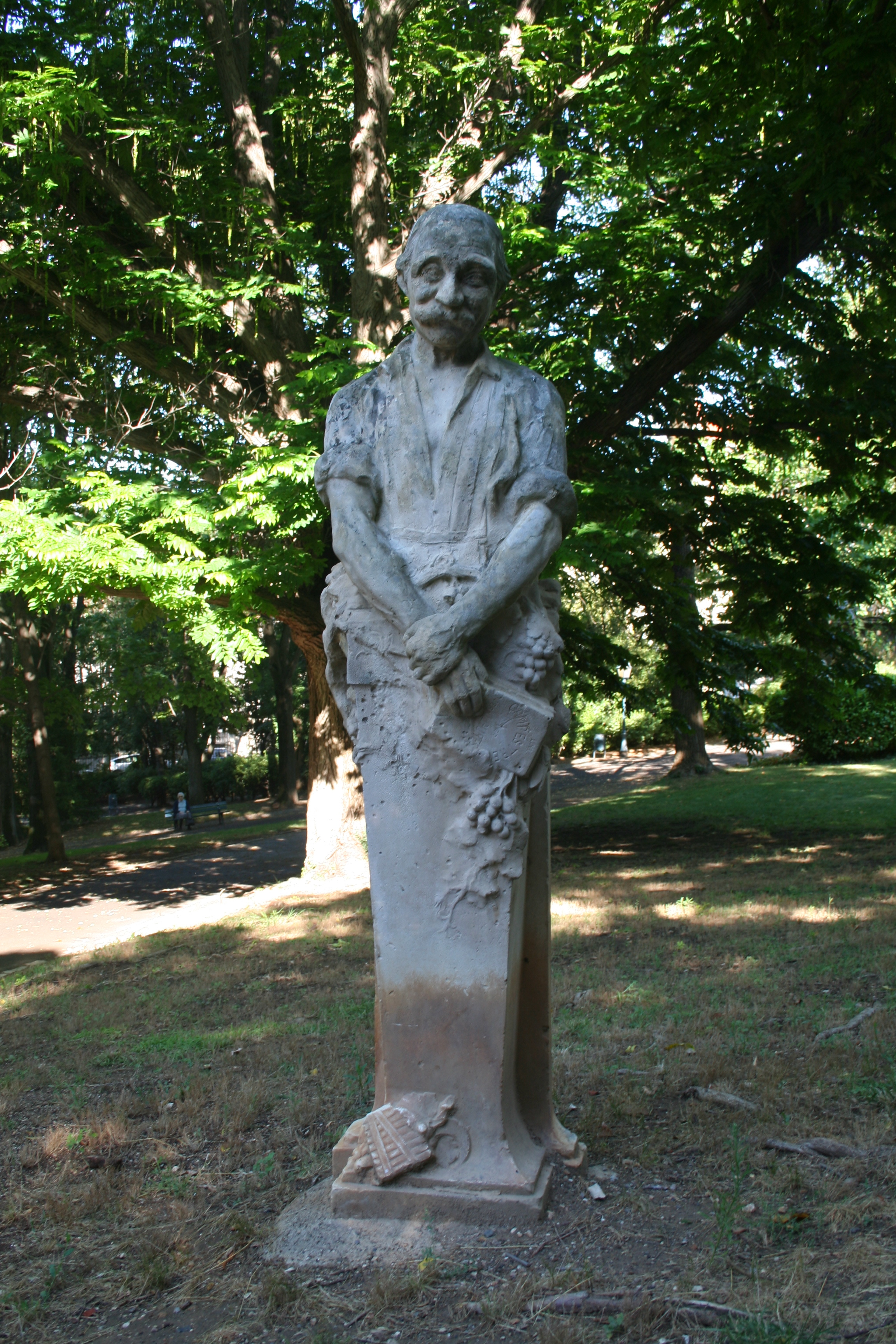 Béziers (Hérault) - Plateau des poètes - statue du poète Jean Laures, dit lou campestre, par Jacques Villeneuve (1865-1933).